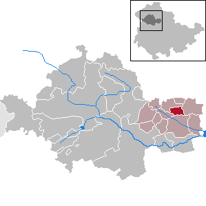 Haussömmern in Thuringia - Unstrut-Hainich-Kreis